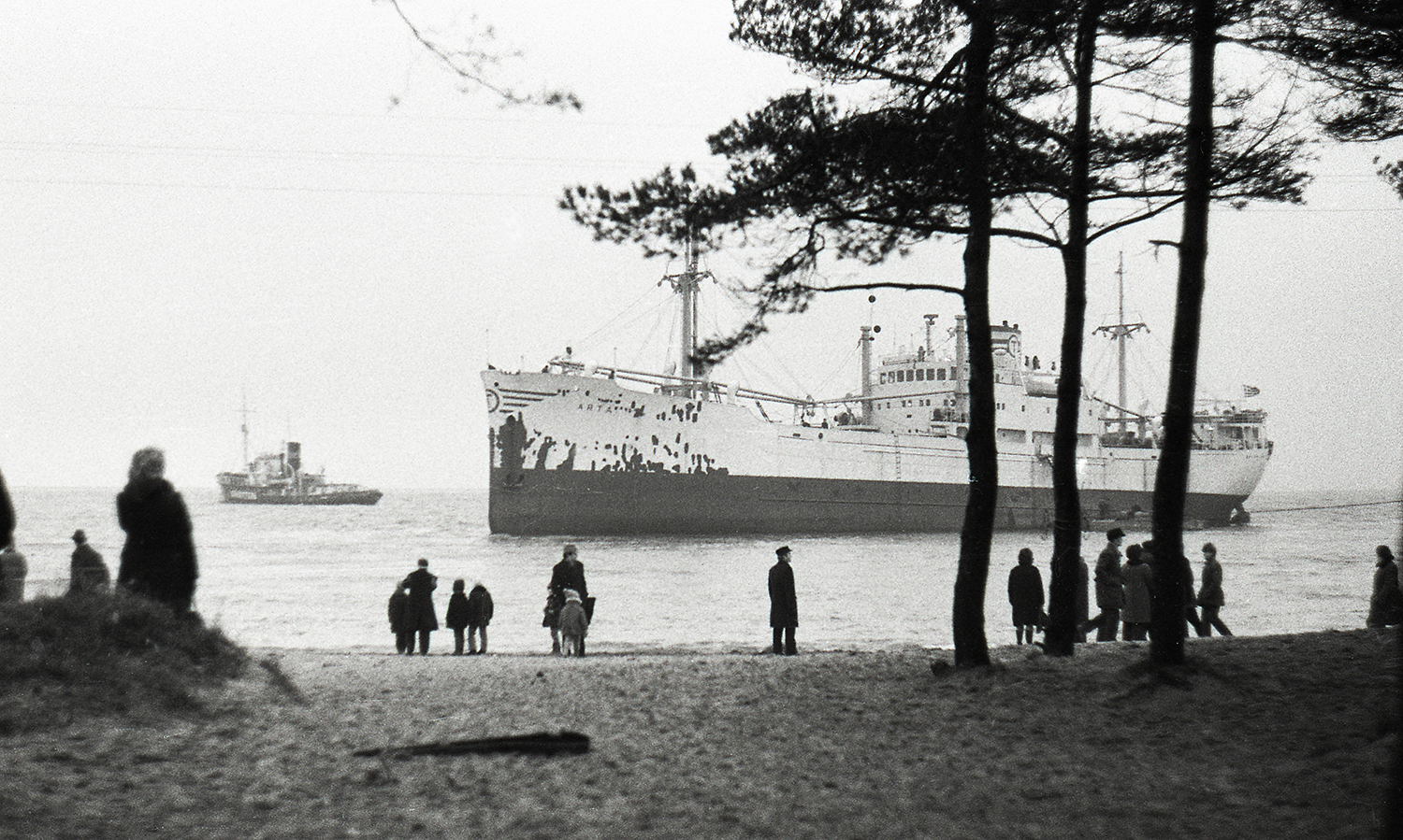 Kreeka kaubalaev madalikul, Pirital 72